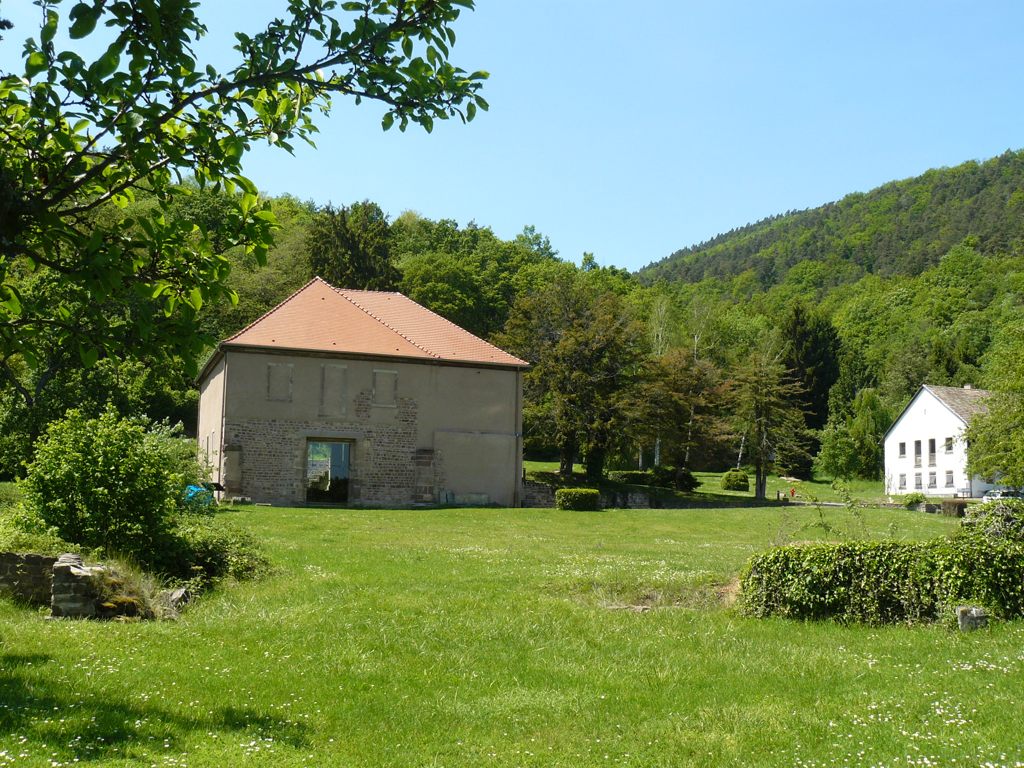 Le Nartheix et la ferme "Der Bauernhoff"